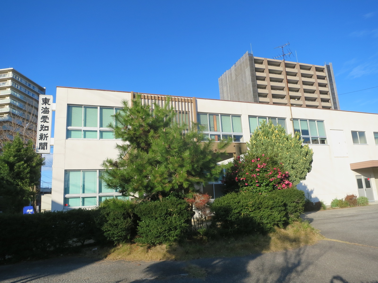 東海愛知新聞社（岡崎市南明大寺町）